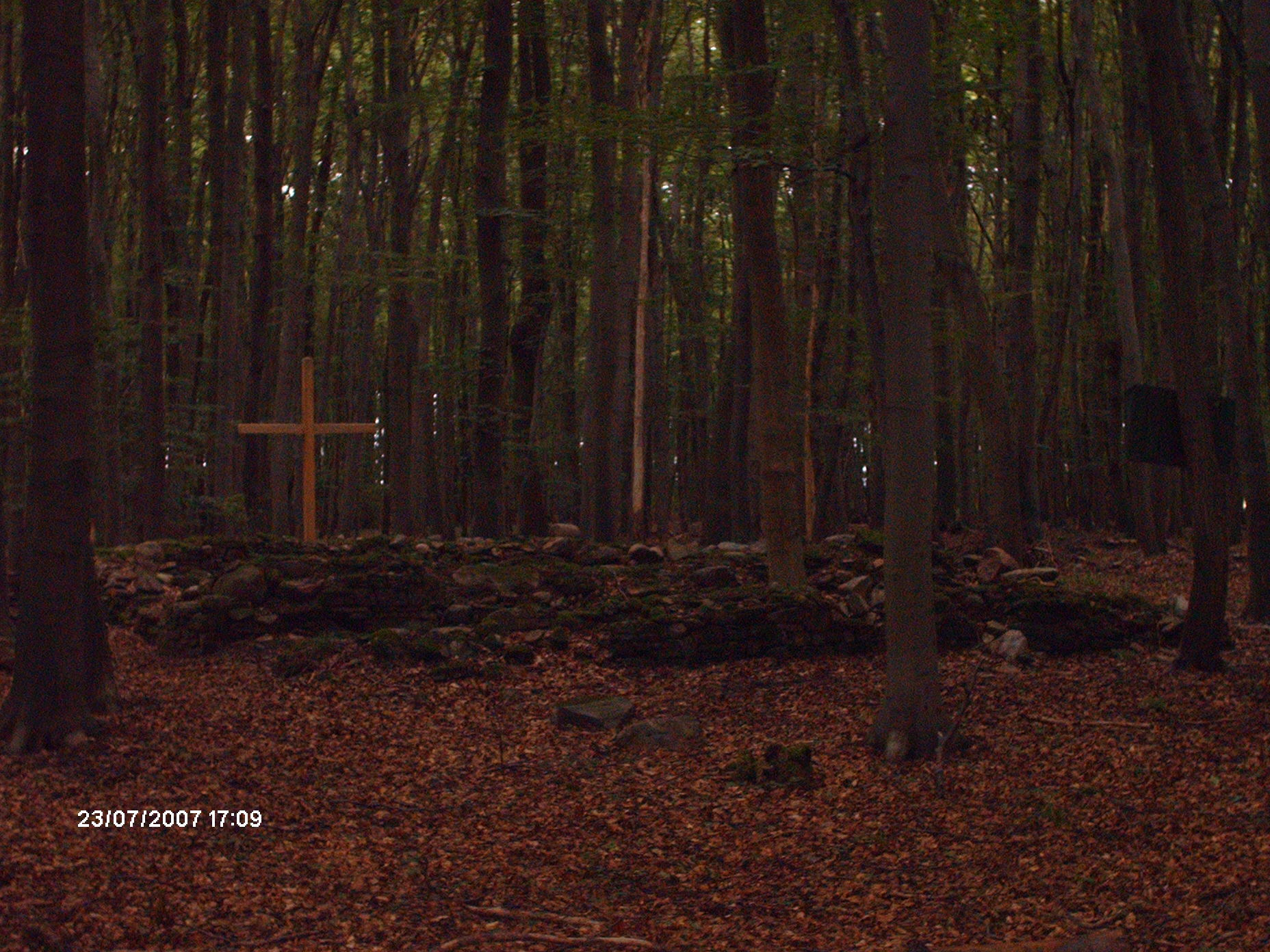 Nievoldhagen